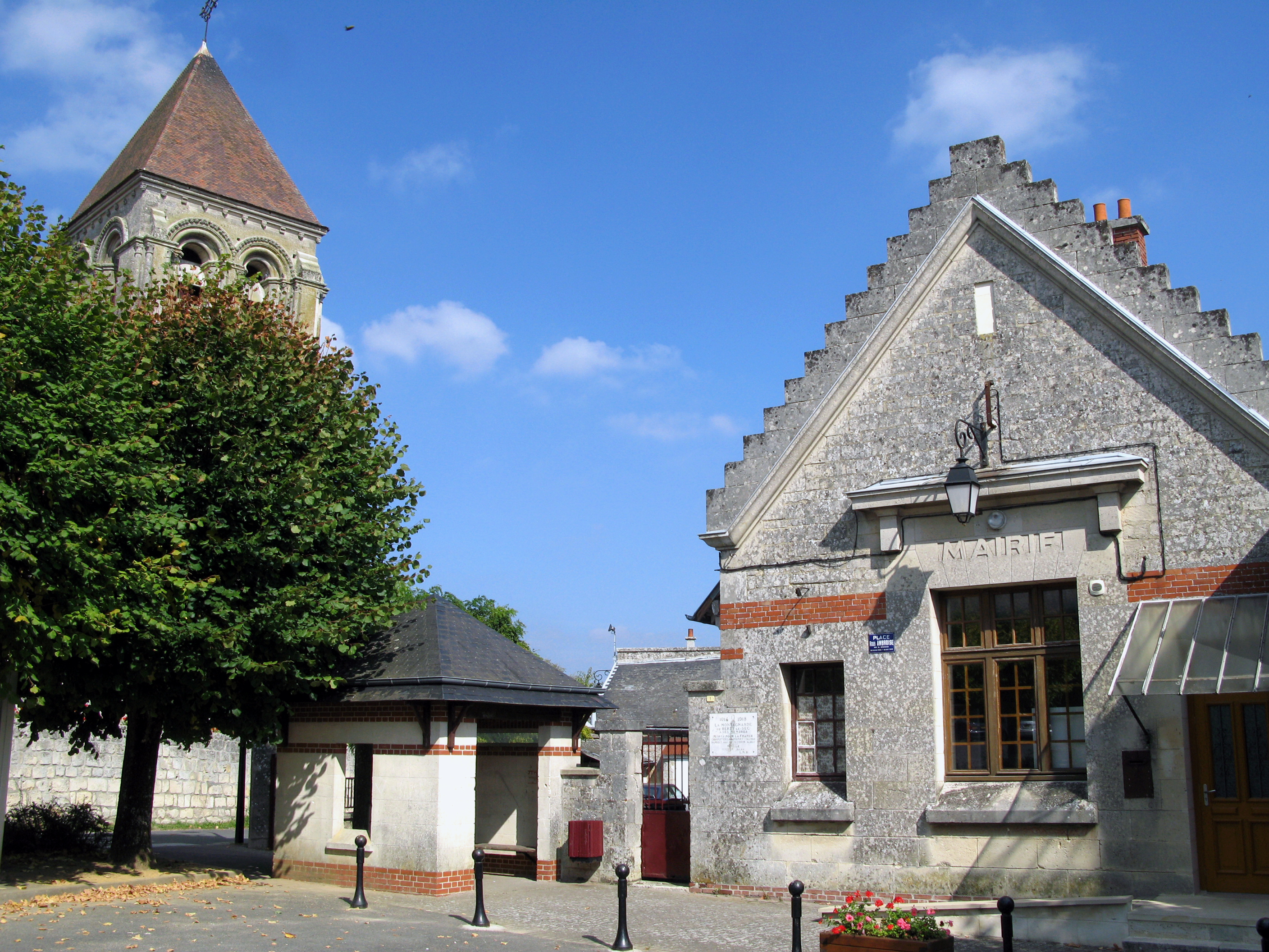 Berzy-le-Sec (Aisne, France) - La mairie et le clocher de l'église. . .